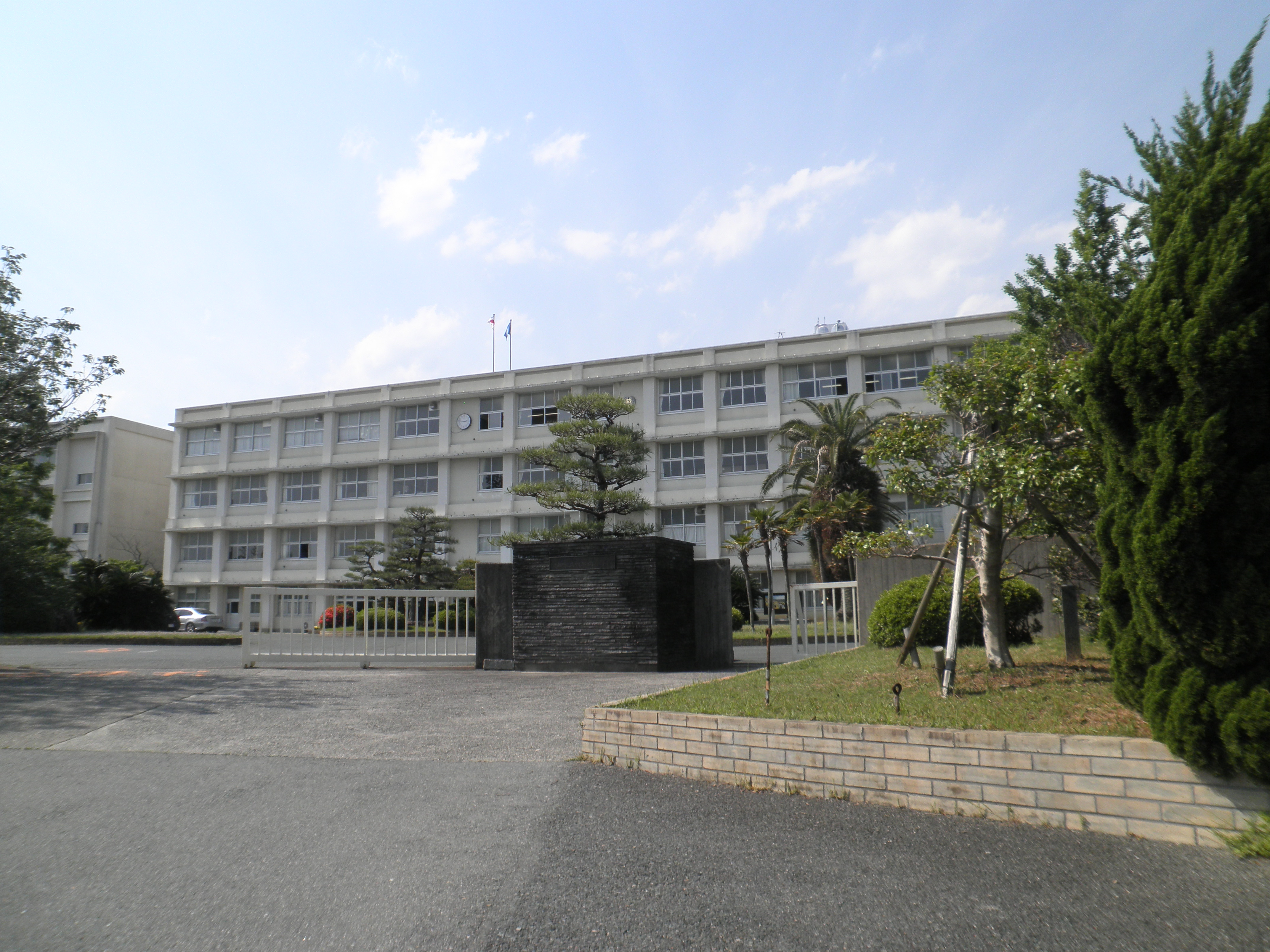 愛知県田原市にある県立成章高校